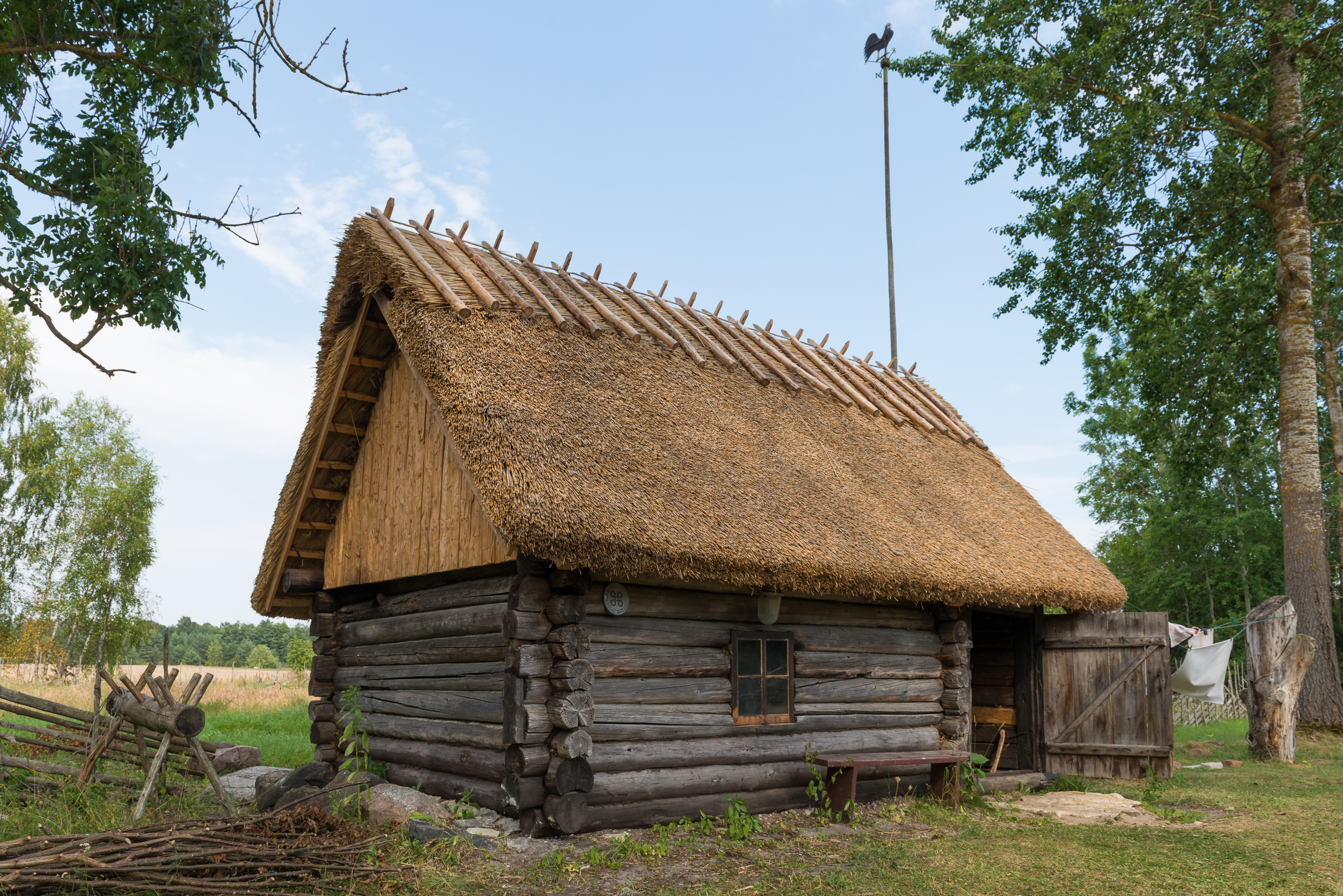 Soera talu suitsusaun Hiiumaal